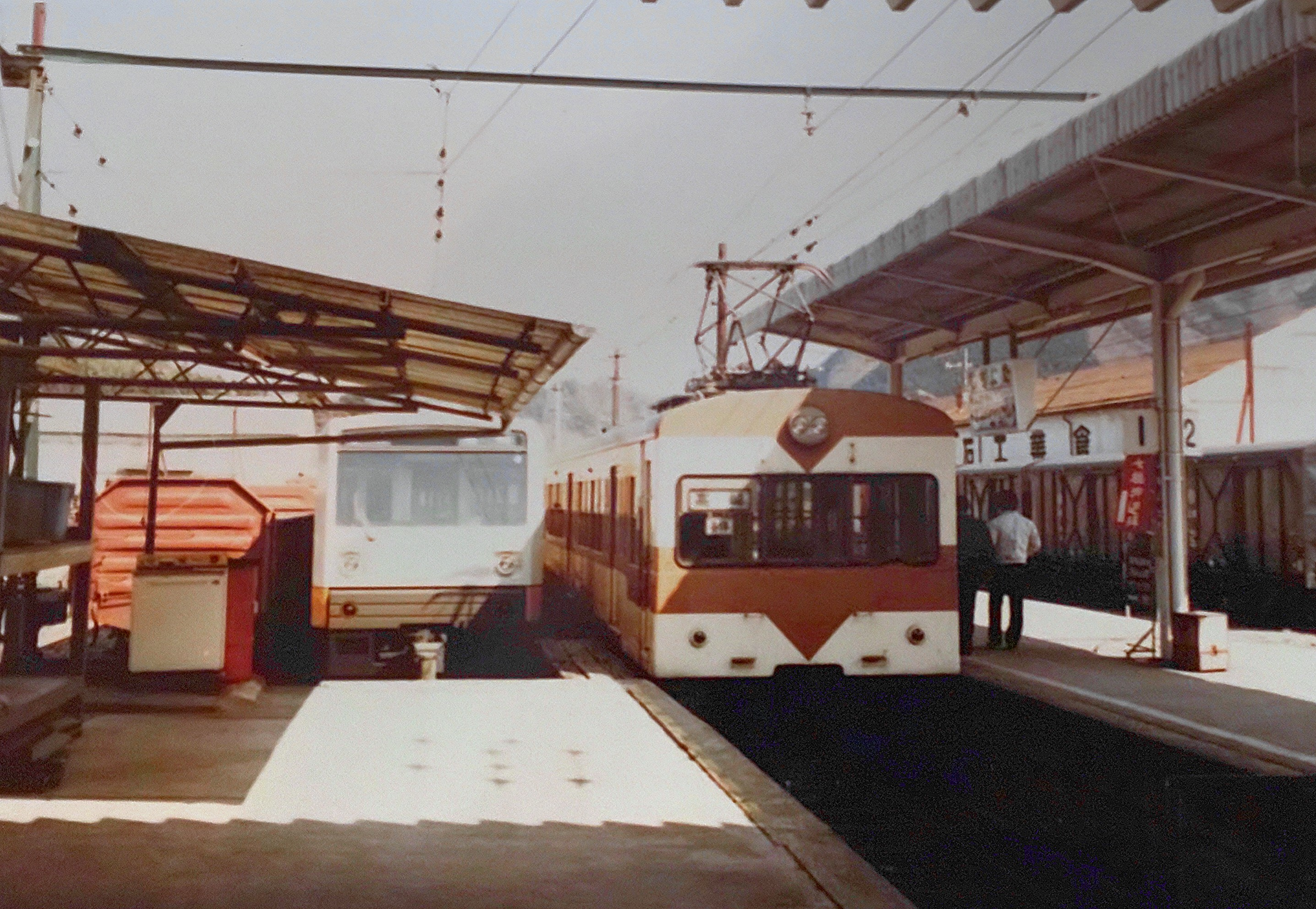 1984年 下仁田駅 100形電車